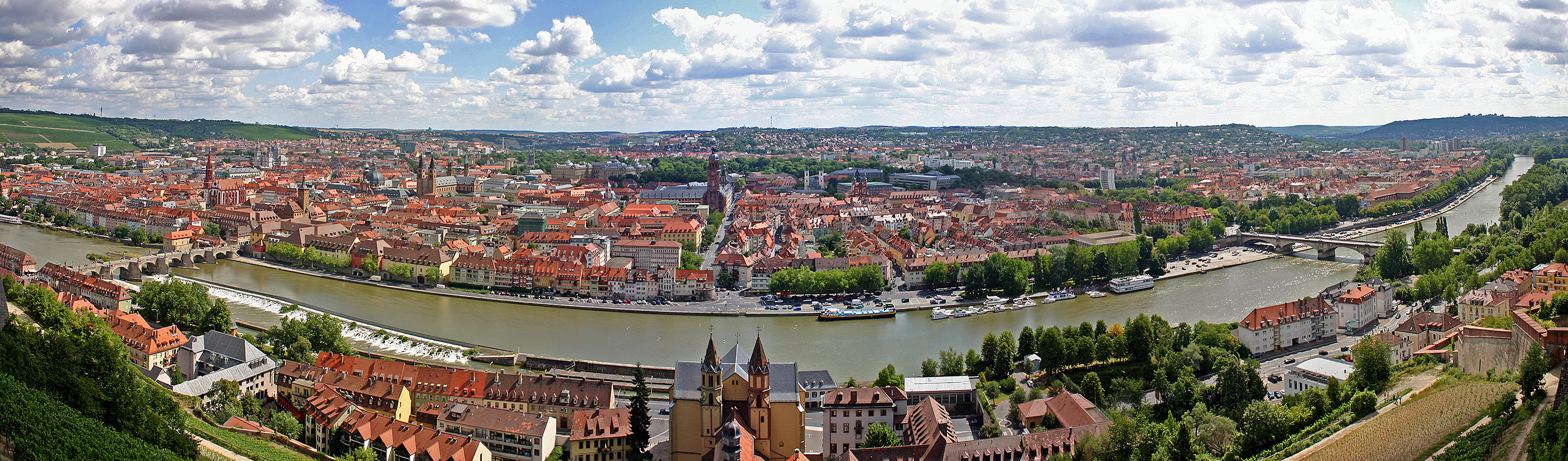 Blick in die Würzburger Altstadt von der Festung Marienberg aus (Kamera: Canon EOS 300D)